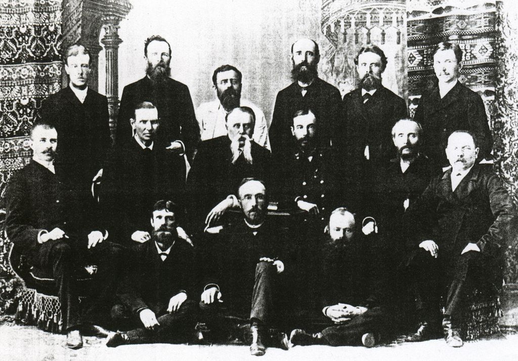 Р.Г.Эльцберг (Эльсберг, Роберт Генрихович) с сослуживцами (третий справа во втором ряду). 1890-е годы.